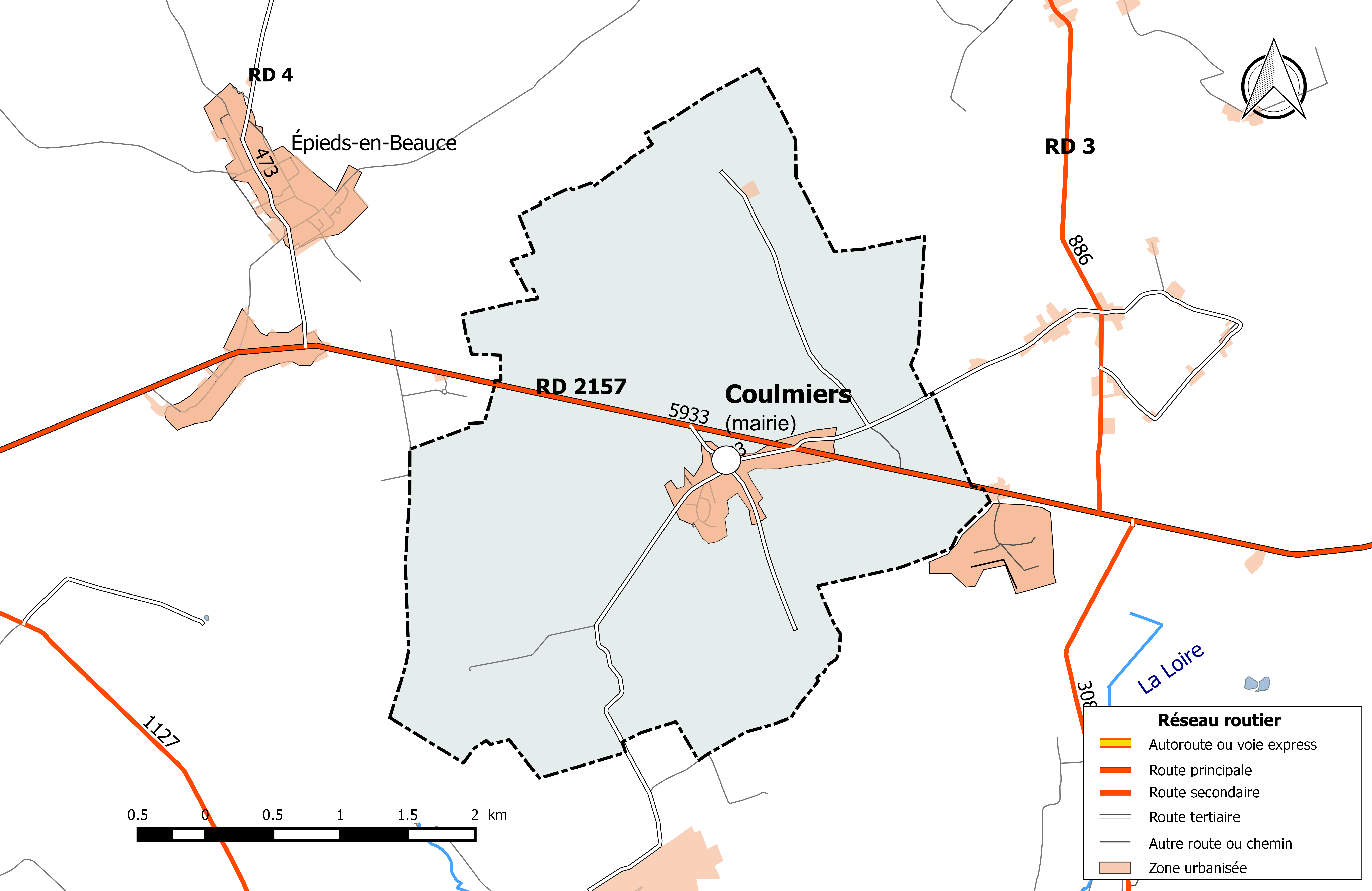 Carte du réseau routier de la commune de Coulmiers.